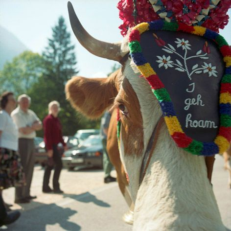 Brauchtum in Bayern (Deutschland)